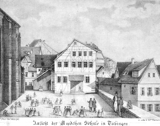 "Ansicht der Mädchen Schule in Tübingen" (Lithographie: Blatt 12,5 × 16,2 cm; Träger 30 × 36 cm); Schefold 9441. Die Mädchenschule stand auf dem Platz hinter der Stiftskirche.